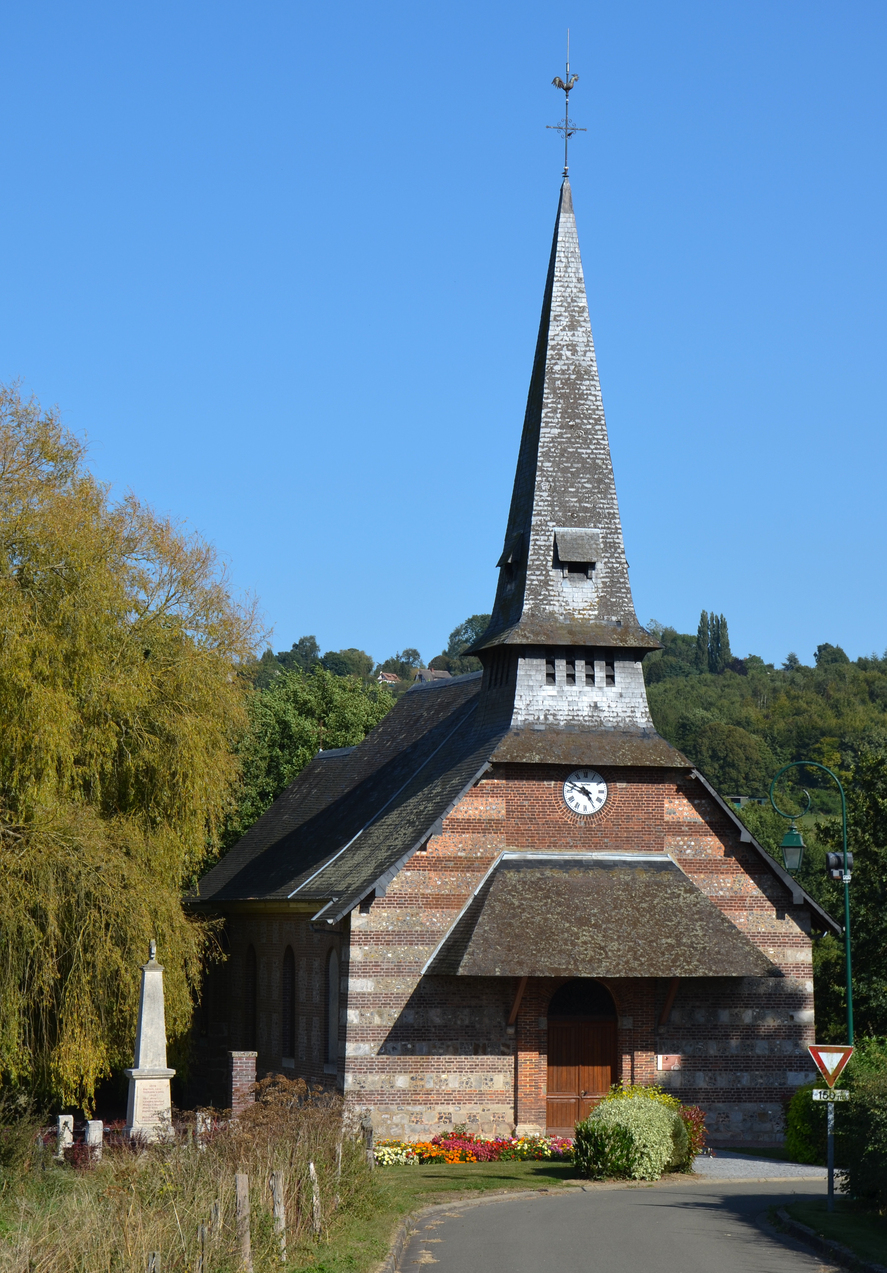 Église Sainte-Geneviève de Perruel, Eure, Normandie, France